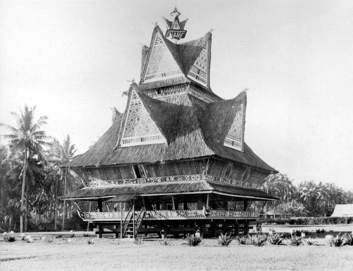 Negatief. Adathuis te Arnhemia, Sumatra